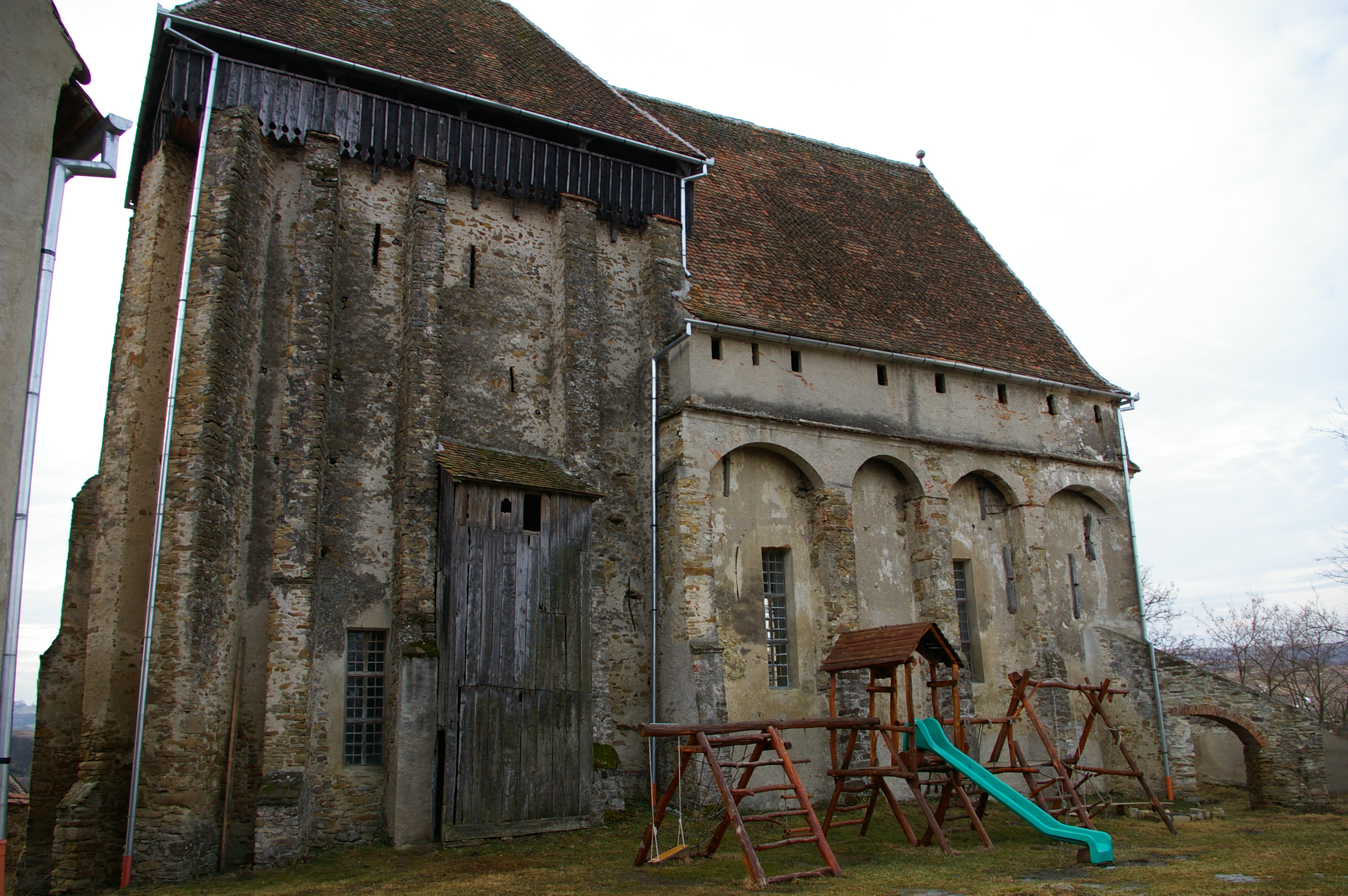 Wehrgeschoss der Wehrkirche in Seligstadt von Norden mit Treppenaufgang